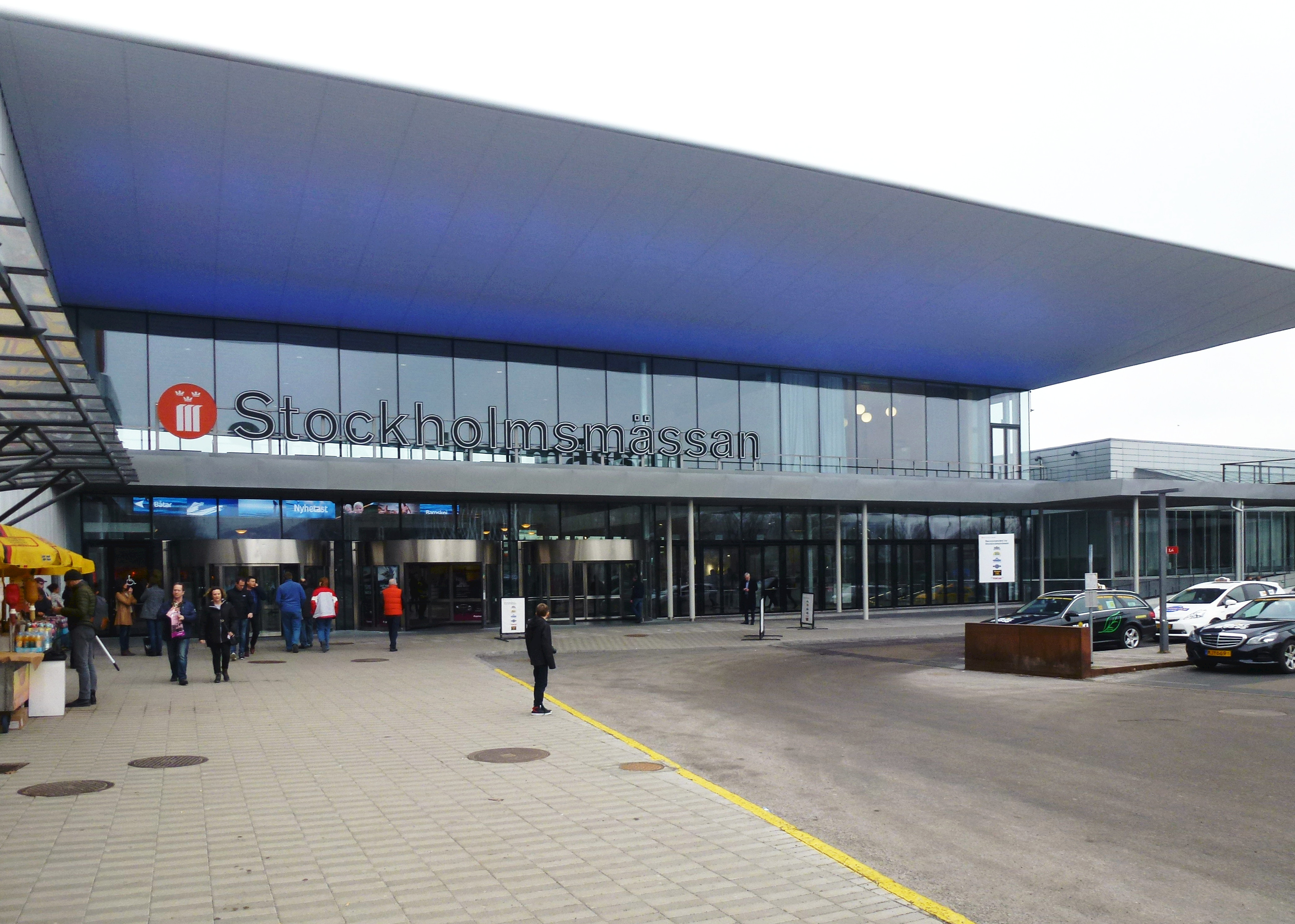 Stockholmsmässan huvudentré